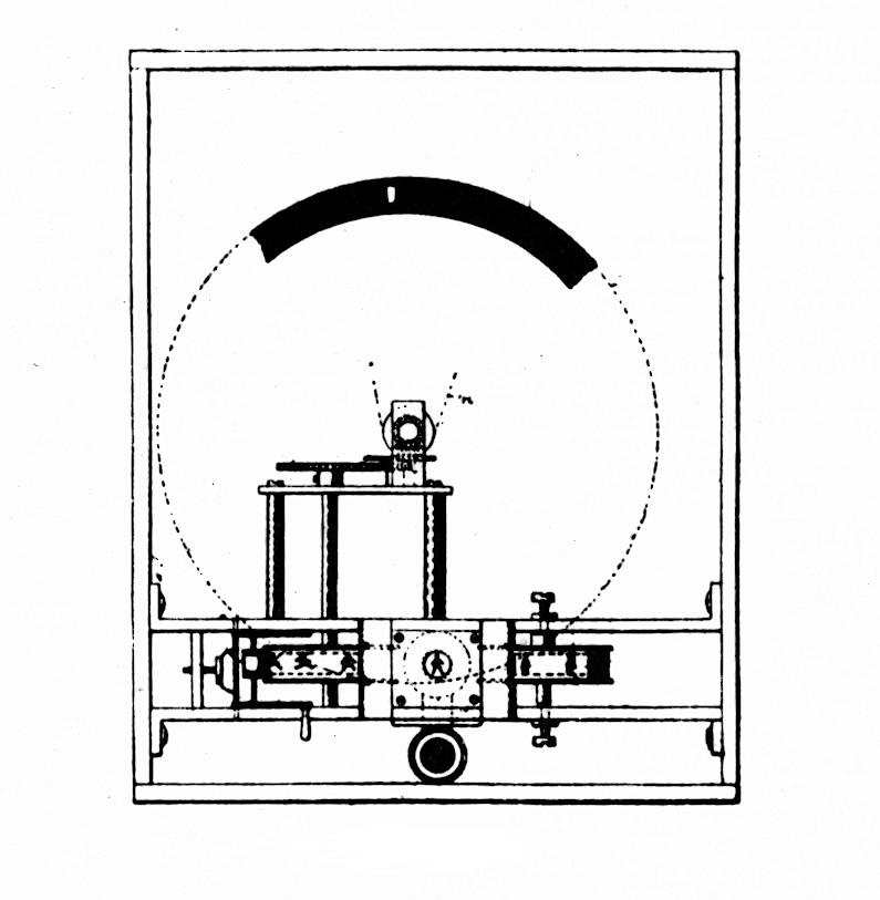 Diagramme réalisé par Edison sur son Kinetoscope